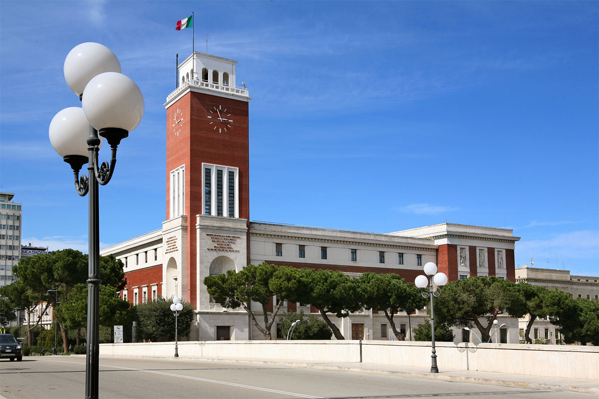 Il Palazzo di Città di Pescara con la sua Torre dell'orologio